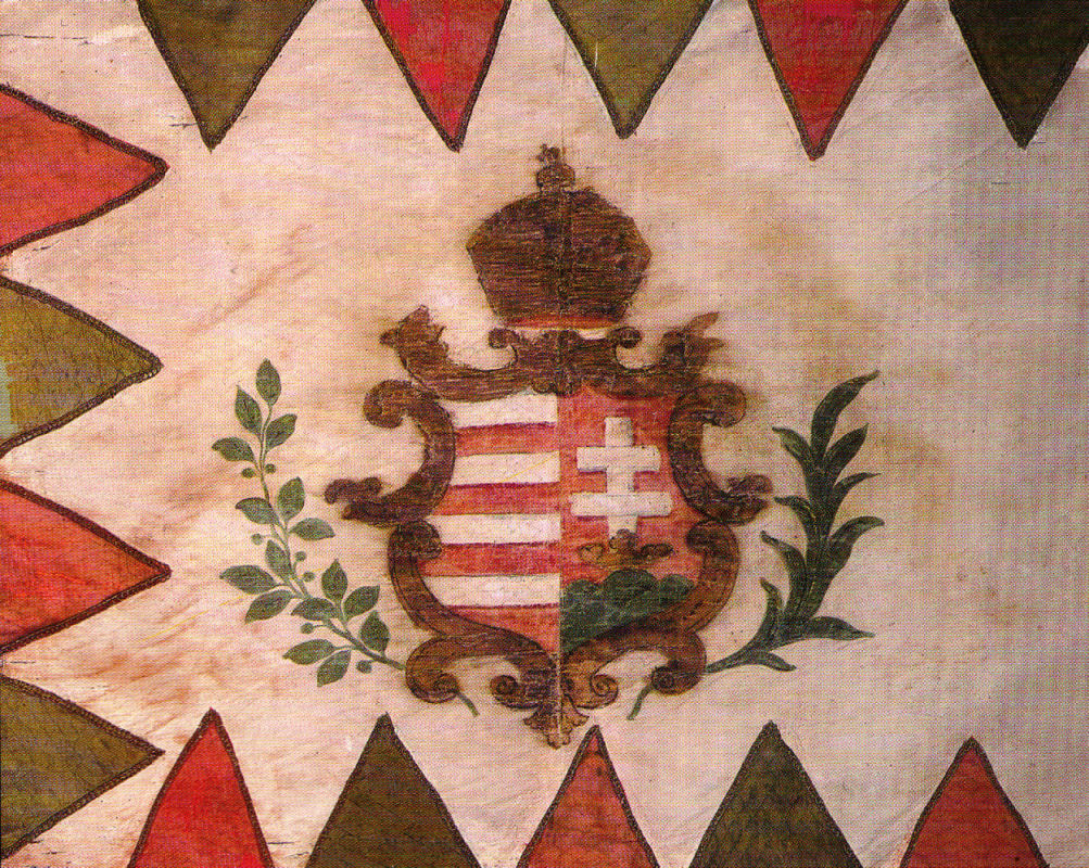 A 10. (Vilmos) huszárezred ezredzászlója 1848-ban.